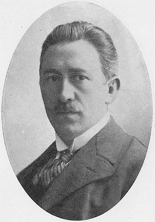 Arkitekten Frans Ekelund